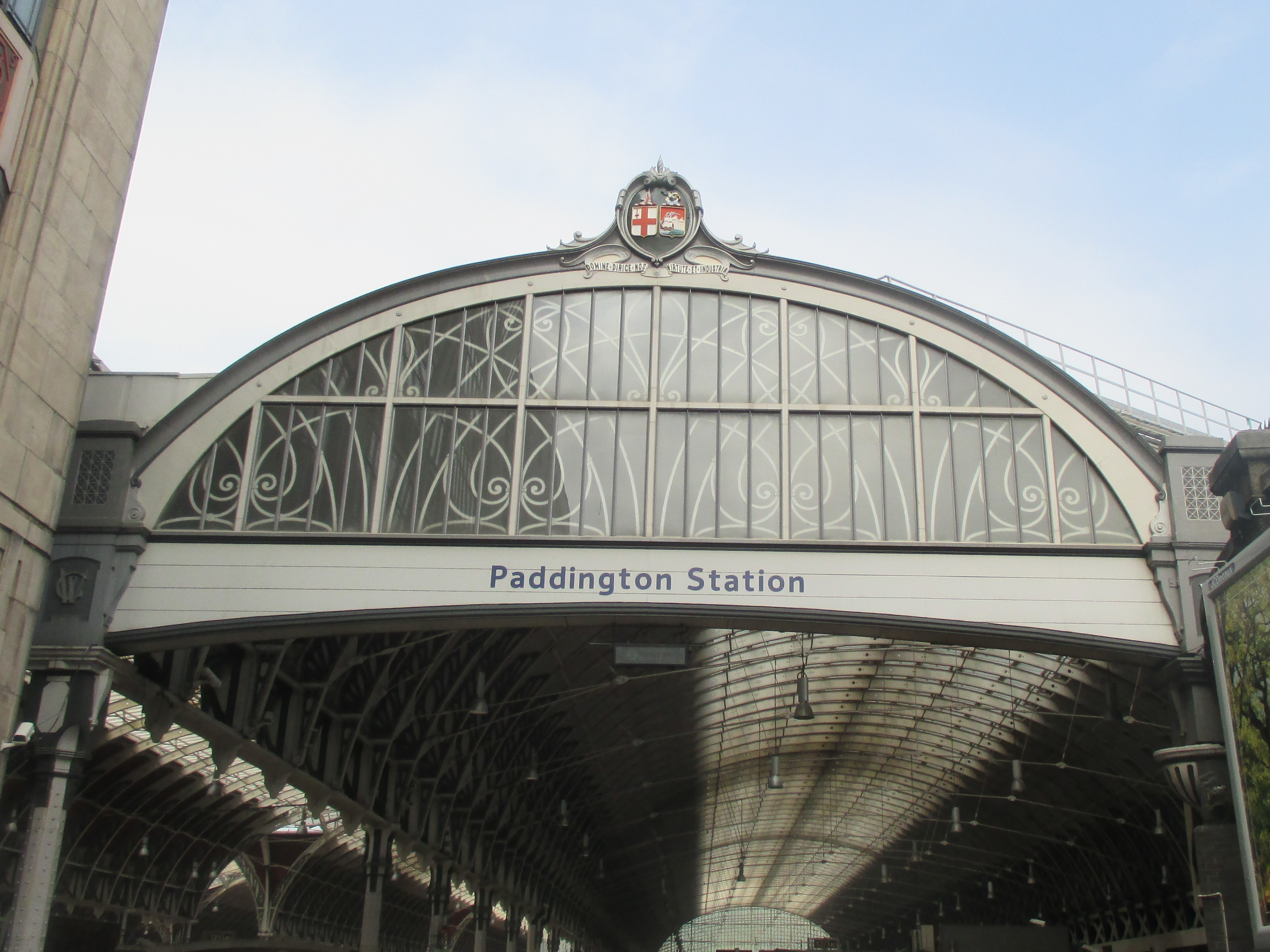 パディントン駅の入り口